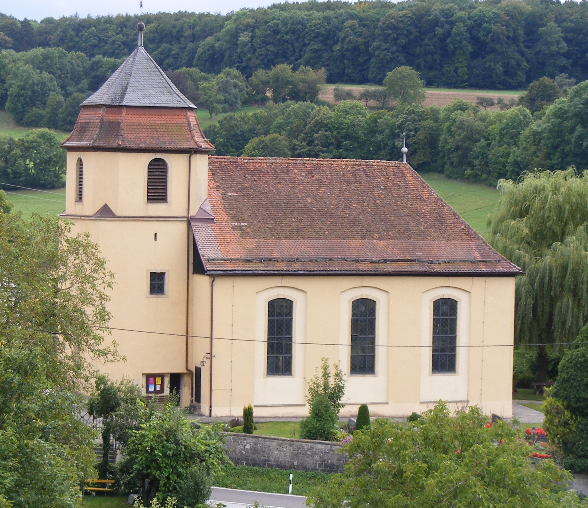 Evangelische Kieche Ettenhausen Umbau von 1785, Turm 13. Jahrhundert